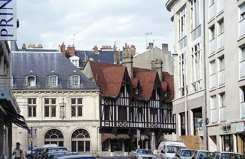 Bilder aus Reims